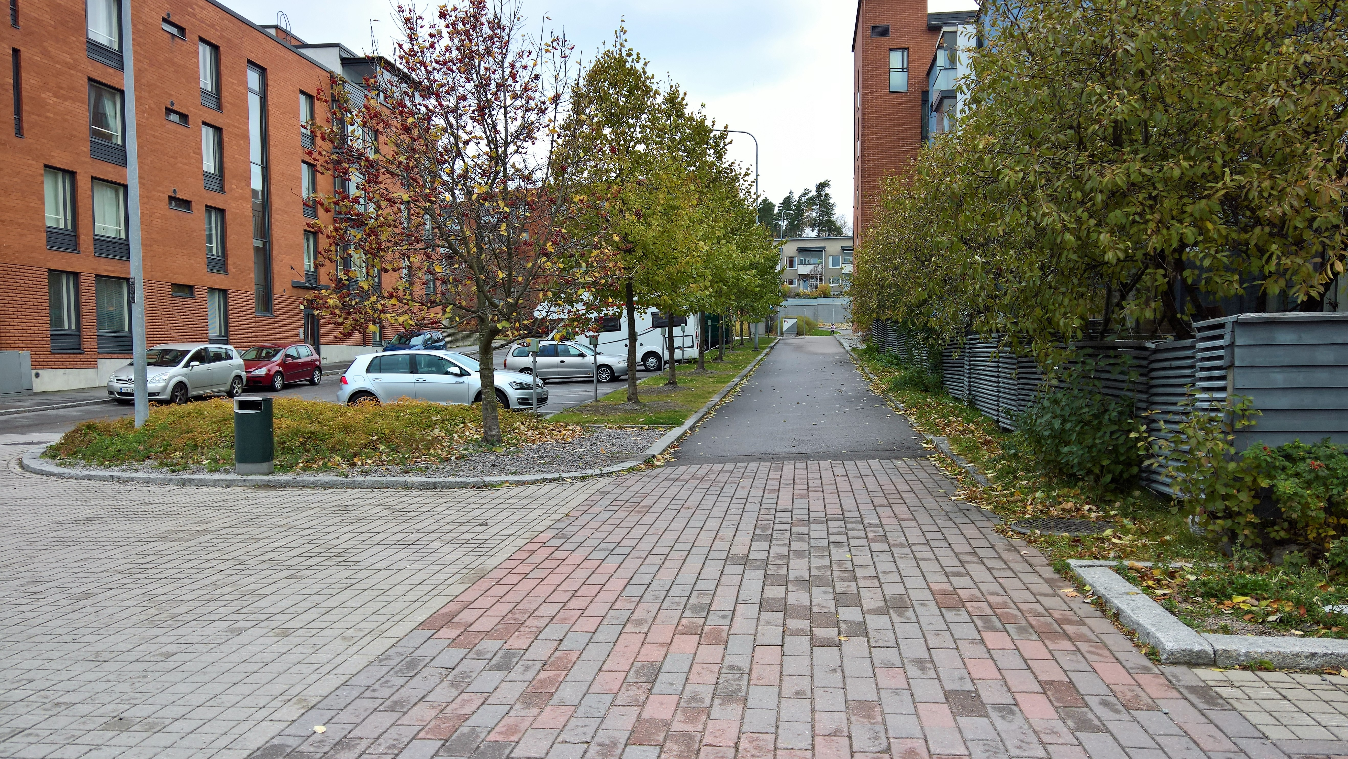 Lautamies Jopin kuja ja katu Latokartanossa Helsingissä 24.10.2016